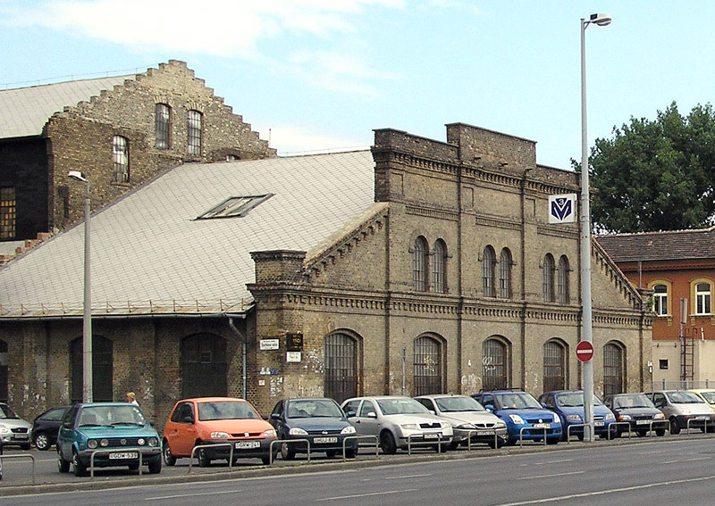 Eredetileg az Eisele-gyár számára Eisele József által 1890-1891-ben épített ipari műemlékvédelem alatt álló műhelycsarnok. Az Alpár Ignác tervezte téglaépület a Váci út és a Turbina utca sarkán áll. 1915-ben került a Láng Gépgyár tulajdonába.